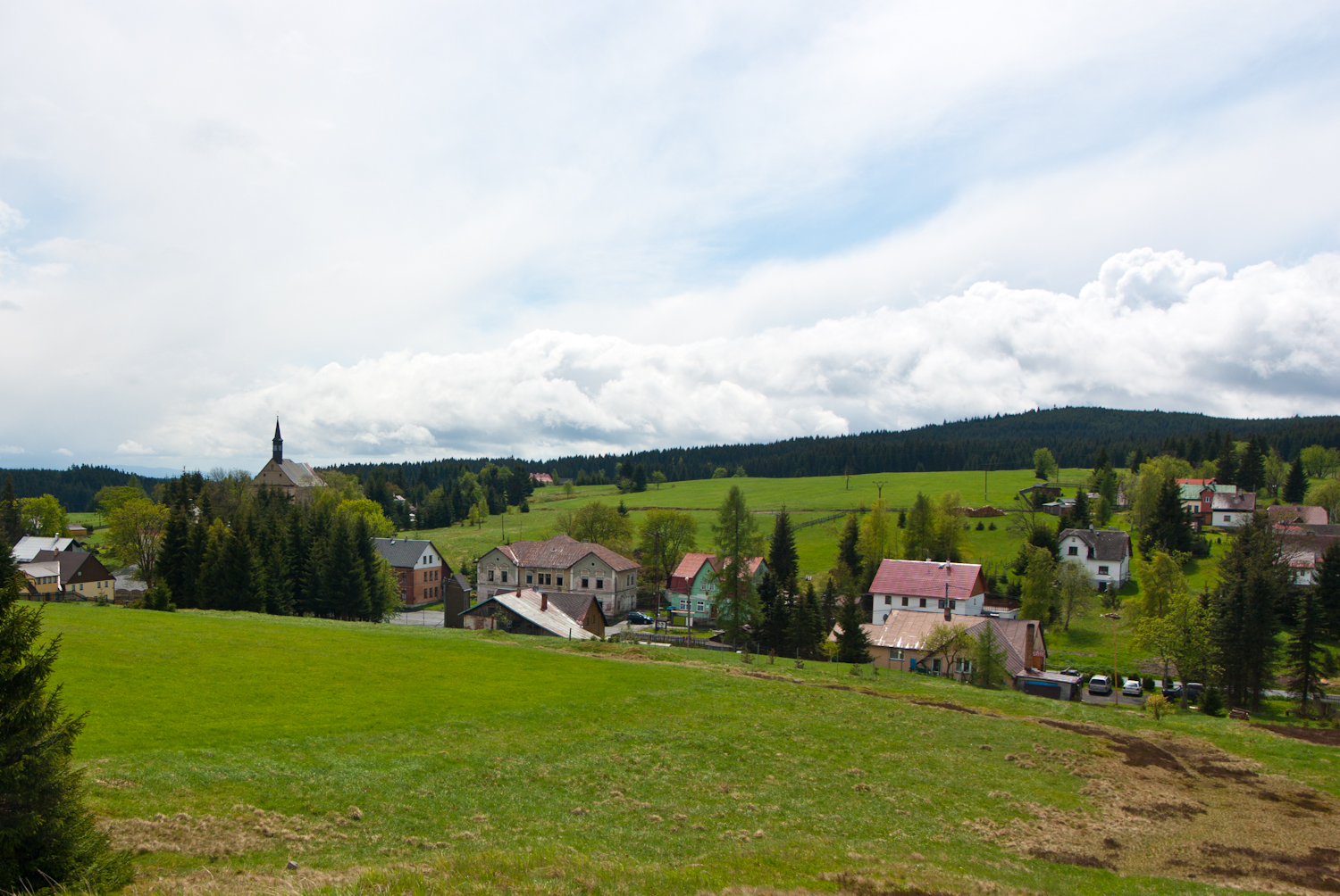 Přebuz Krušné hory